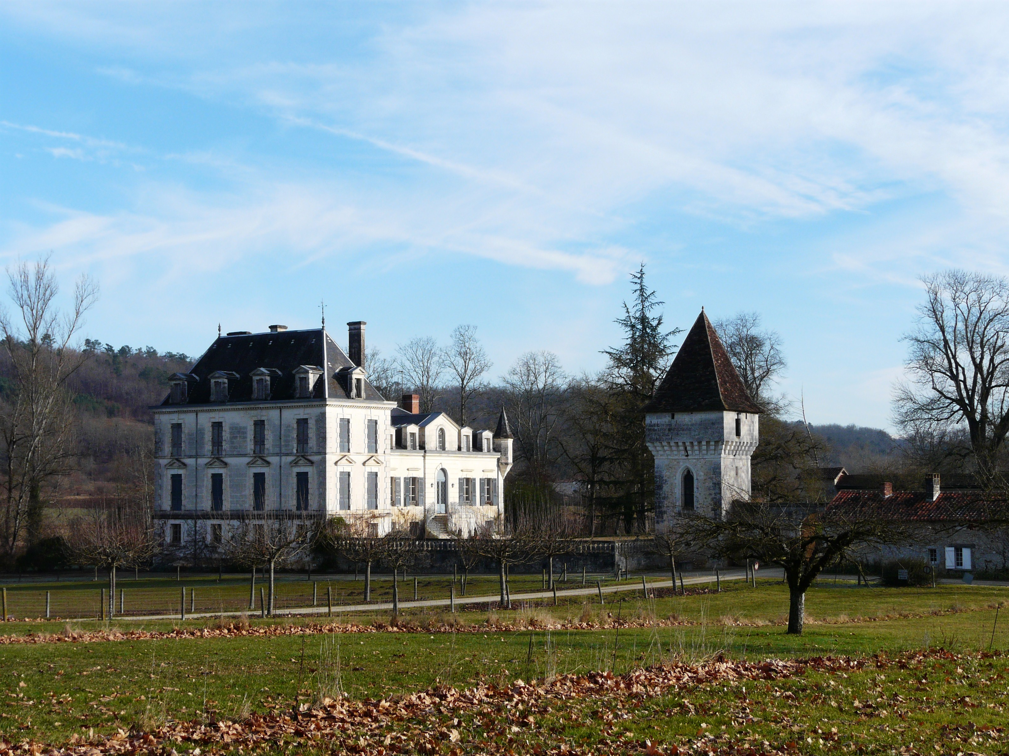 Le château de Montplaisir, Condat-sur-Trincou, Dordogne, France